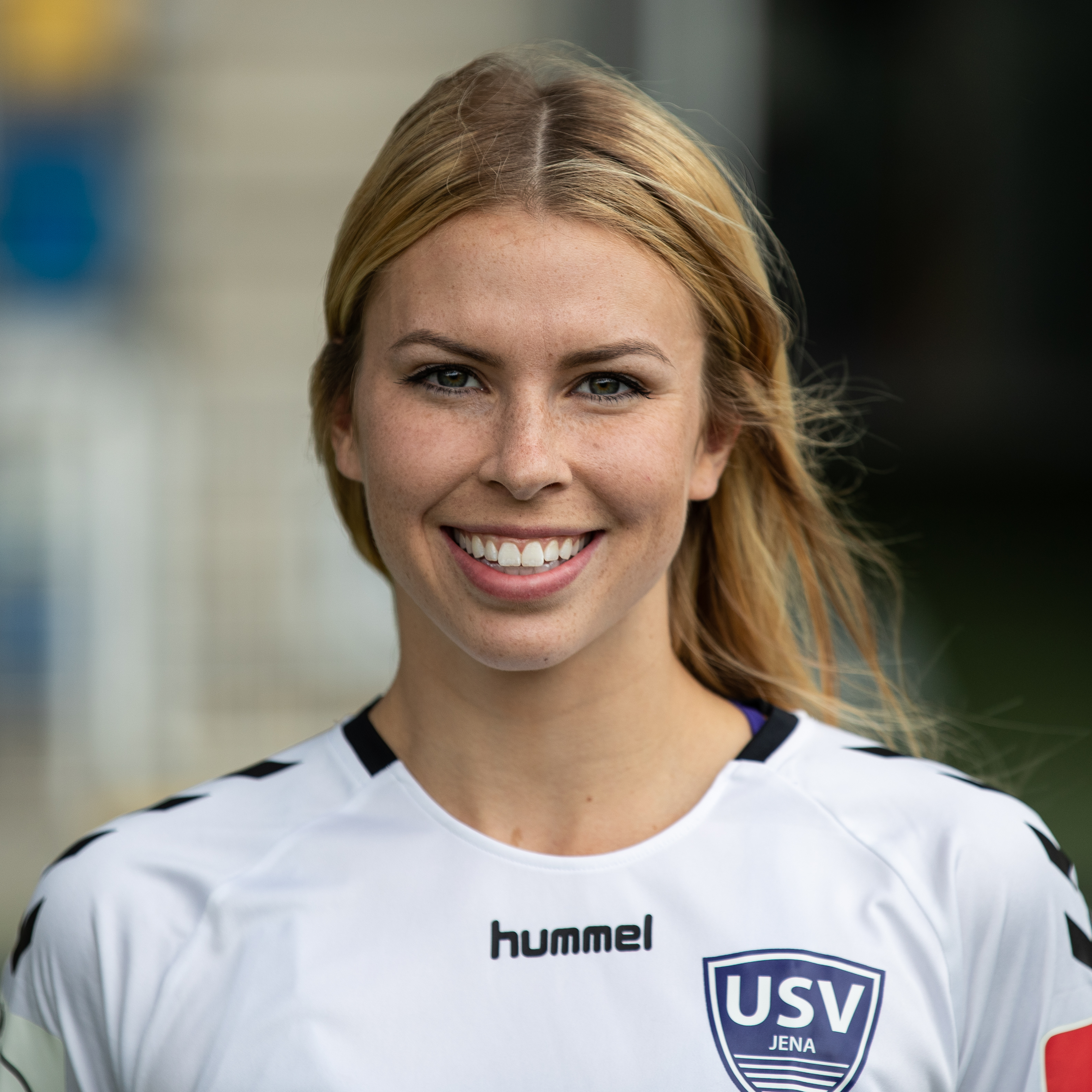 Fußball, Flyeralarm Frauen-Bundesliga, Mannschaftsfotos FF USV Jena; Julie Karn (FF USV Jena, 15); Porträt, Einzelbild